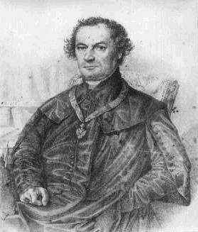 Antonín Vojtěch Hnojek (1799 - 1866), Český katolický kněz a pedagog.